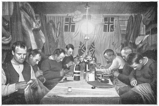 Aan de Zuidpool